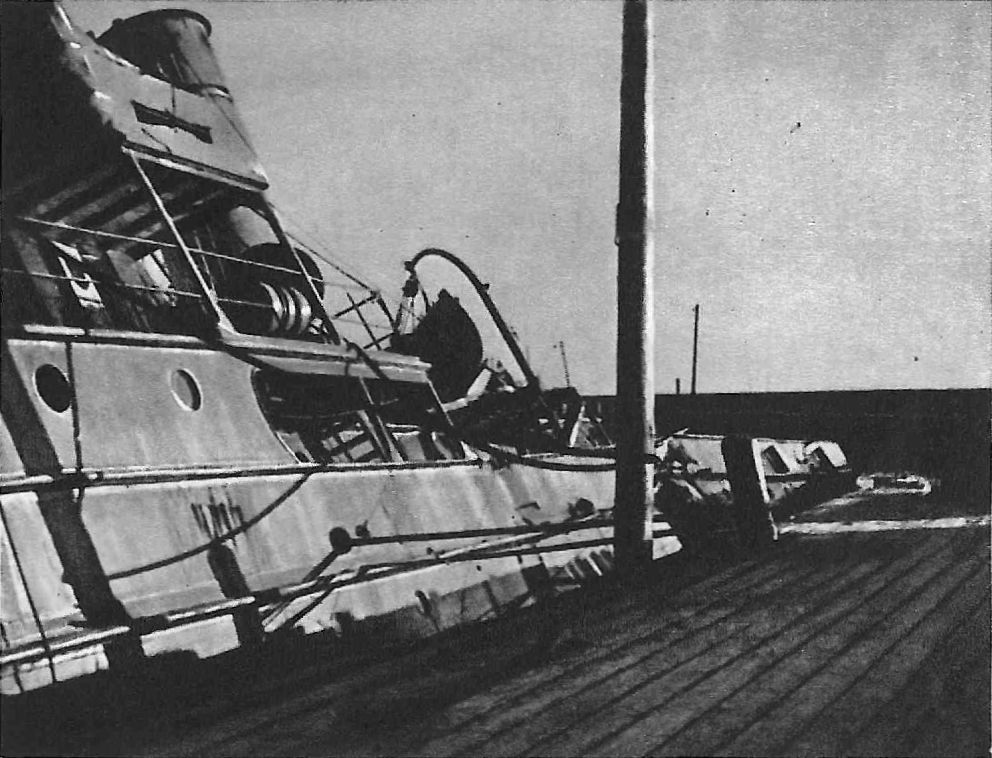 Wrak kanonierki ORP "Generał Haller" w porcie rybackim w Helu, zatopionej 6 września 1939 r.